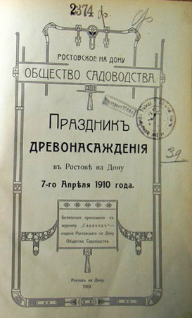 Ростов-на-Дону, Праздник деревонасаждения - журнал Садовод